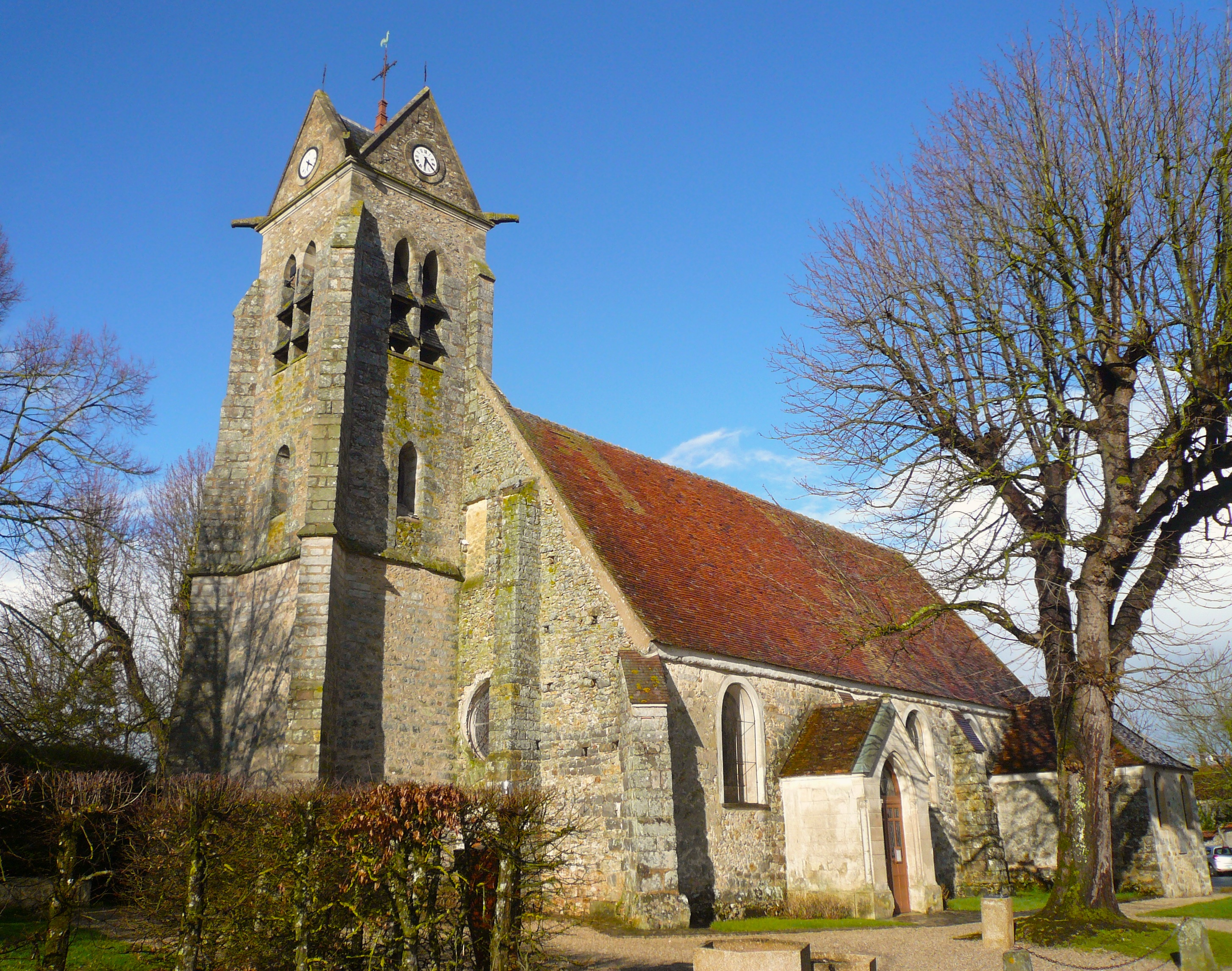 Église Saint-Germain de Sivry-Courtry en Seine-et-Marne.